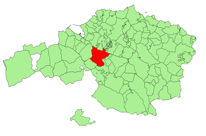 Plaza mayor Map of Bilbao